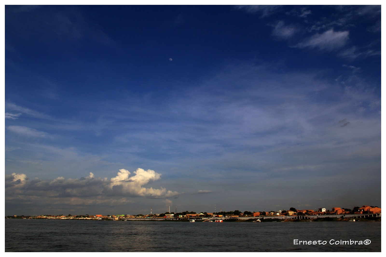 Orla de Marabá vista a partir da praia do Tucunaré.